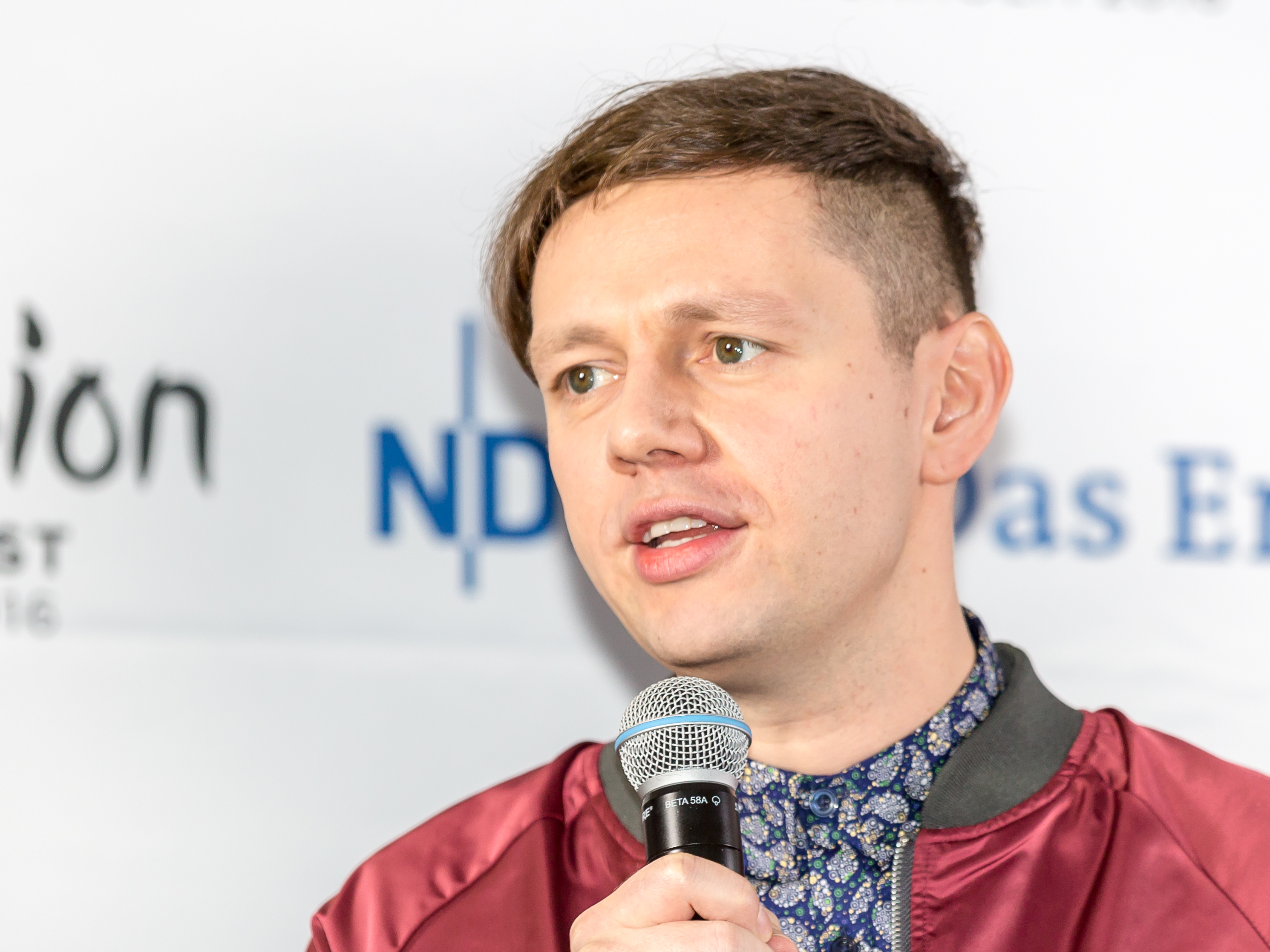 Unser Lied für Stockholm - Pressekonferenz am Probentag: Woods of Birnam Foto: Christian Friedel